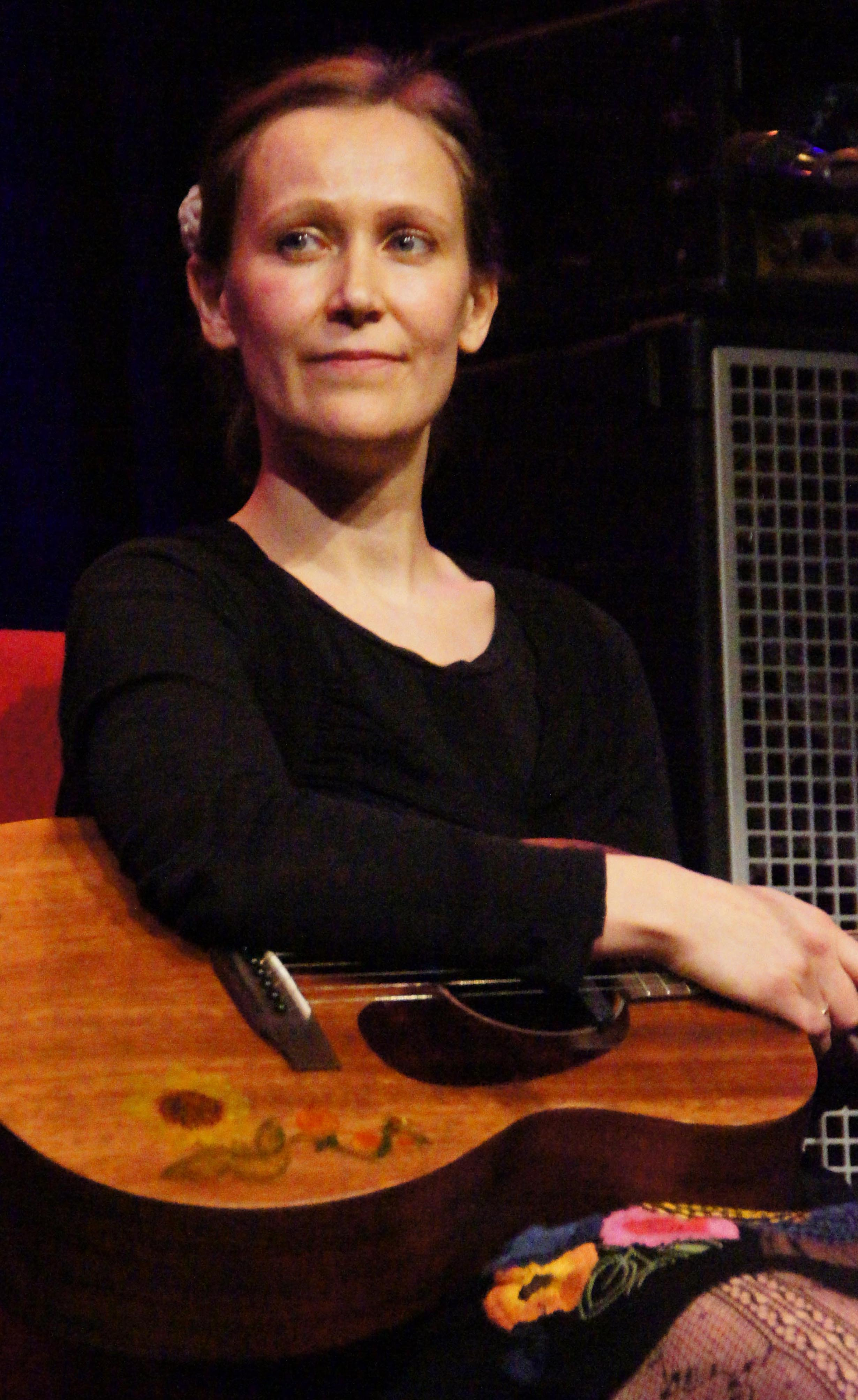 Vienna 2013-12-01 Porgy&Bess - Sibylle Kefer Duo, Sibylle